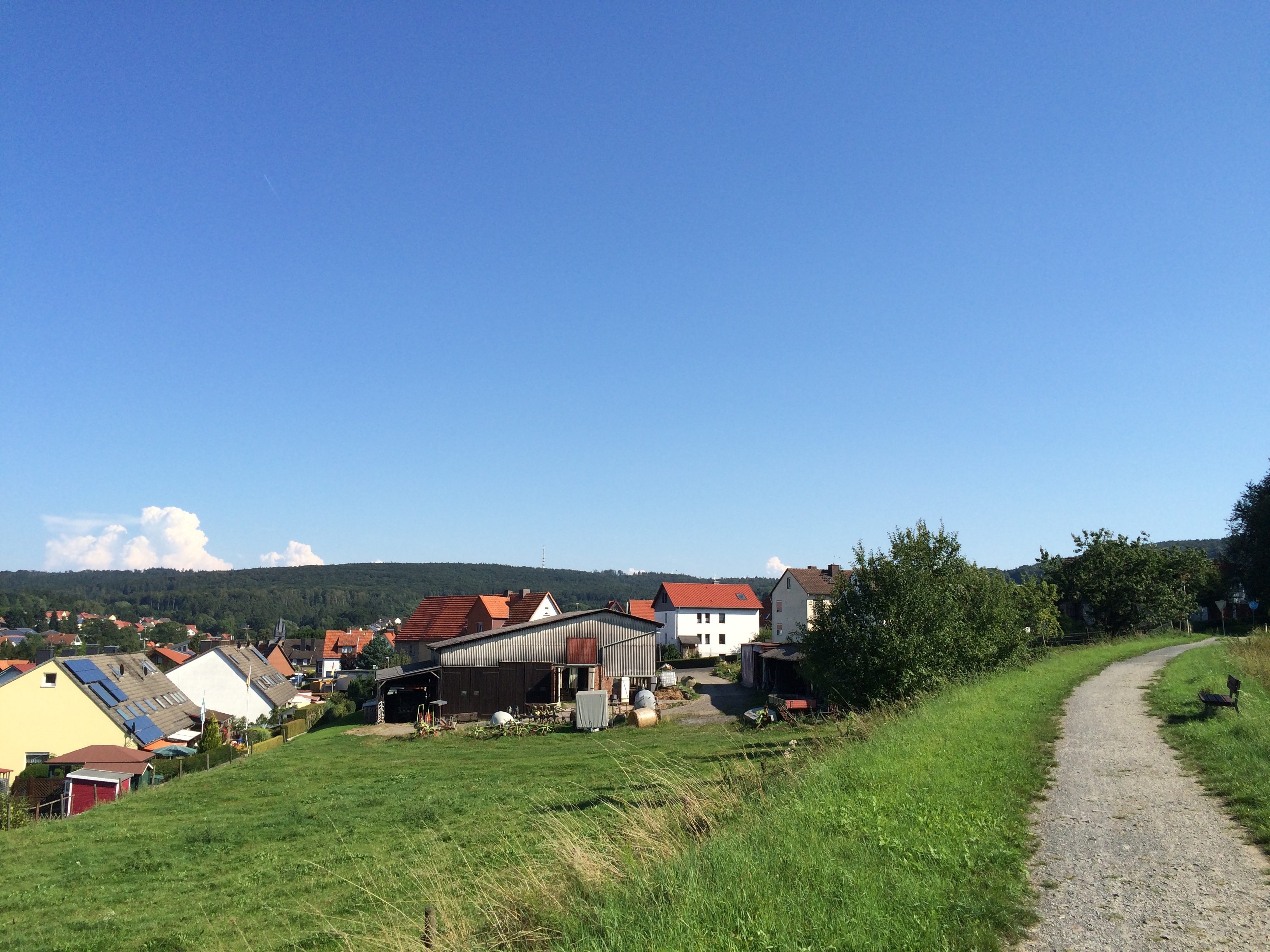 Ehemalige Bahntrasse der Söhrebahn zwischen Schillerstraße und Goethestraße